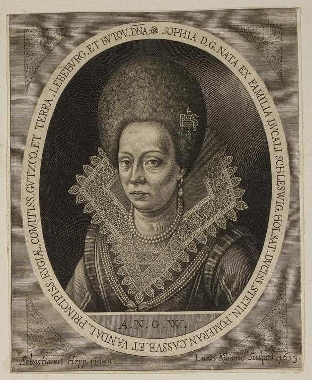 Grafik aus dem Klebeband Nr. 1 der Fürstlich Waldeckschen Hofbibliothek Arolsen Motiv: Sophia von Schleswig-Holstein-Gottorf, Ehefrau von Herzog Johann VII. von Mecklenburg